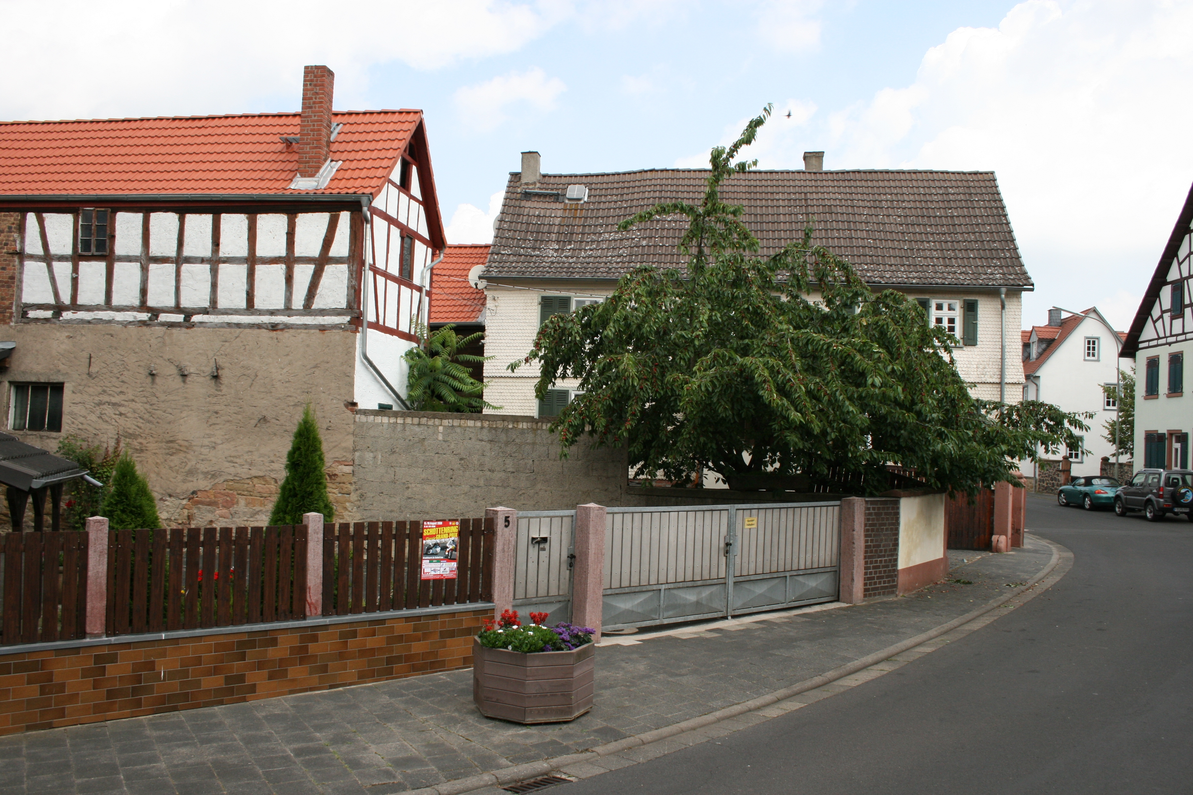 Vom Kastell Altenstadt ist oberirdisch nichts mehr zu sehen. Einzig diese Kurve im Verlauf der Frankfurter Straße erinnert noch an das Kastell.